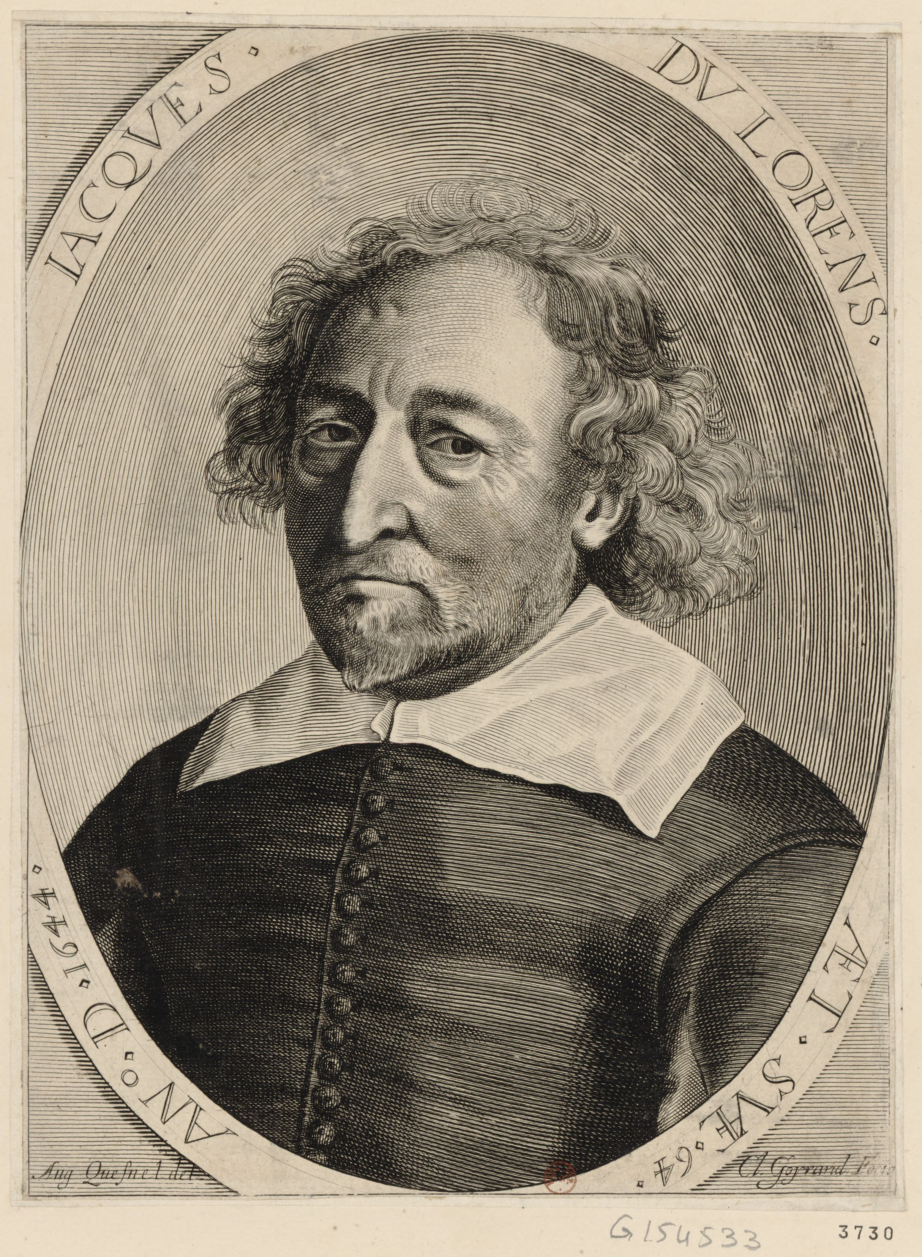 Portrait de Jacques Du Lorens, en buste, de 3/4 dirigé à gauche dans une bordure ovale : [estampe]